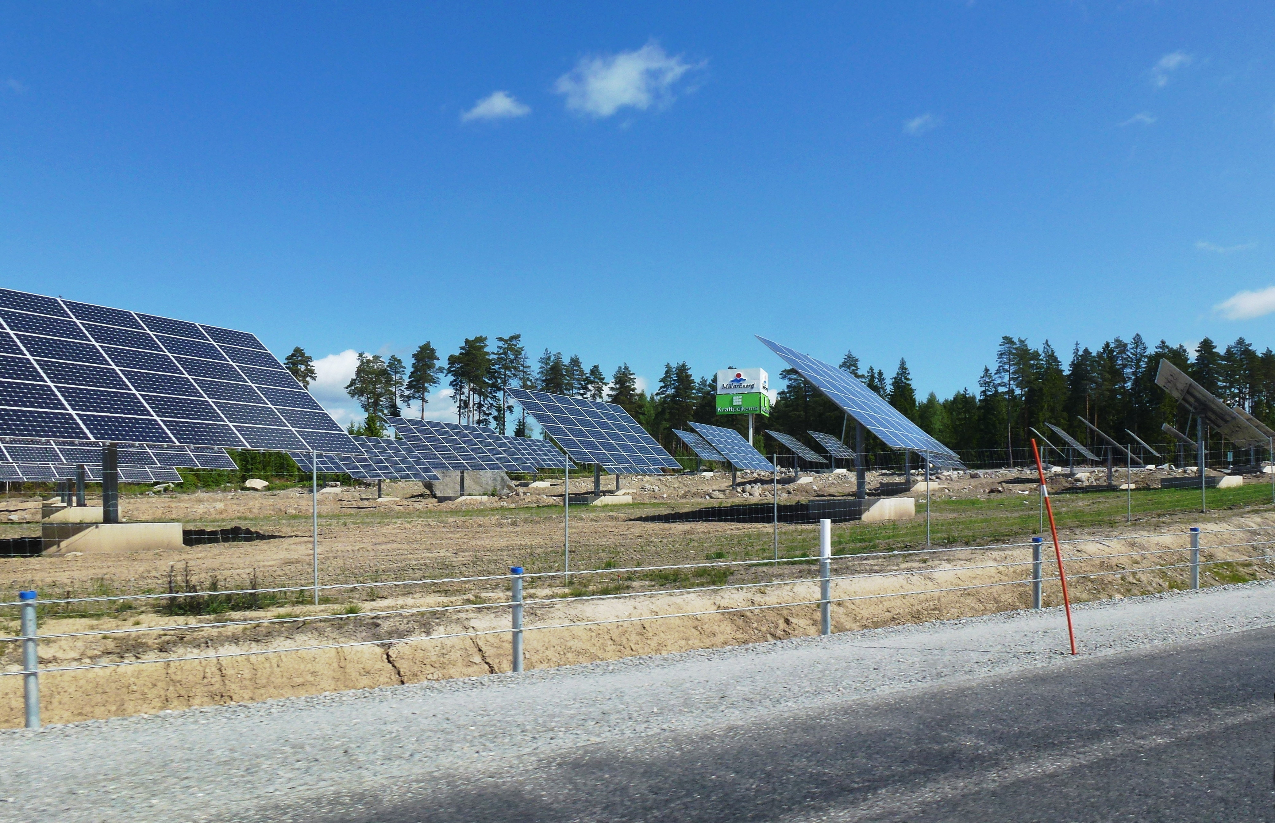 Mälarenergis och Kraftpojkarnas "Solpark"